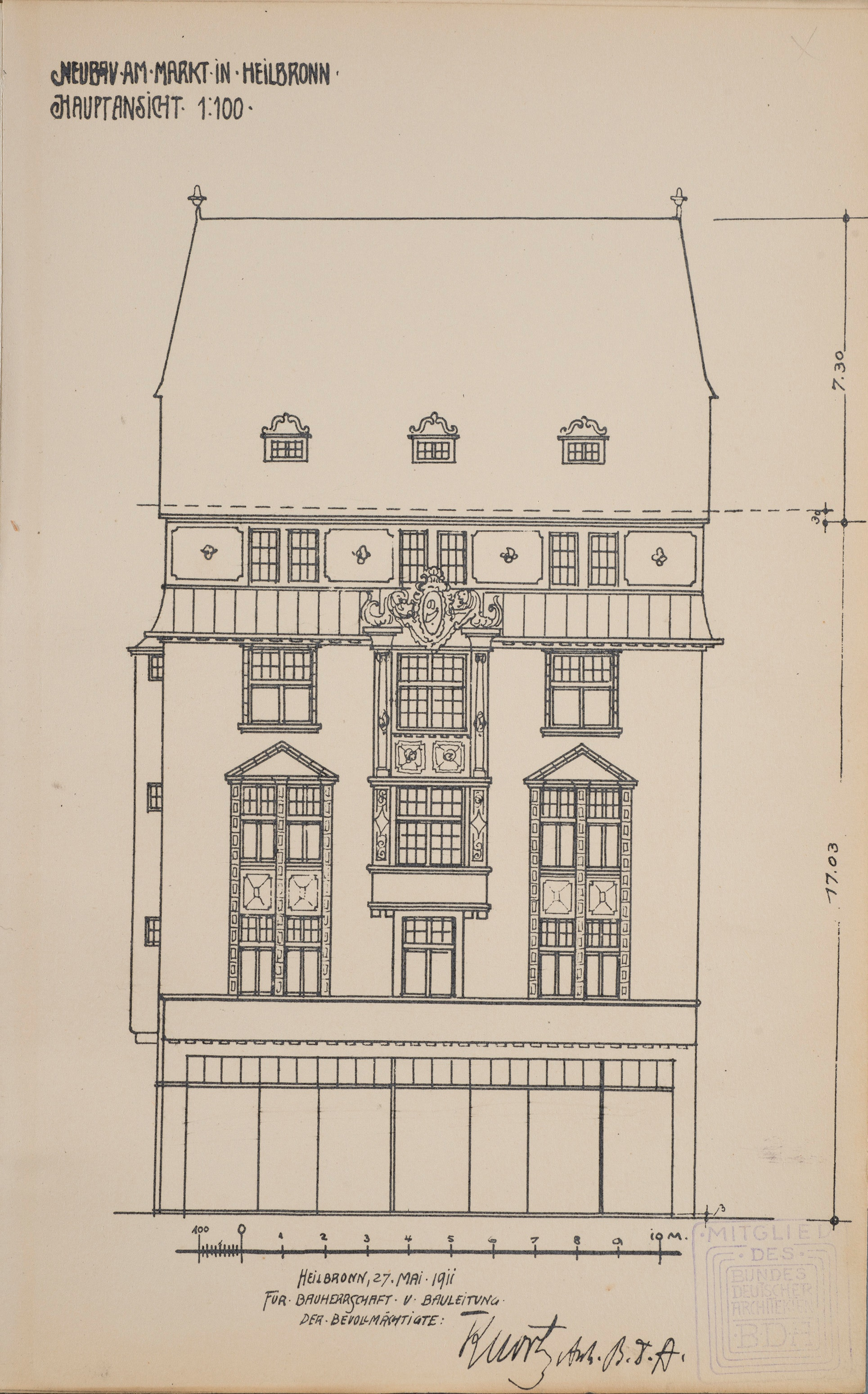 Heilbronn, Kaiserstraße 30, nicht ausgeführte Fassade, Entwurf Ludwig Knortz (* 5. Oktober 1879; † 3. November 1936)